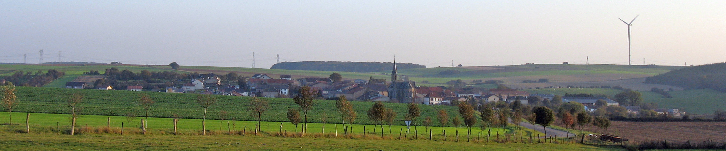 Vue op Momerstroff